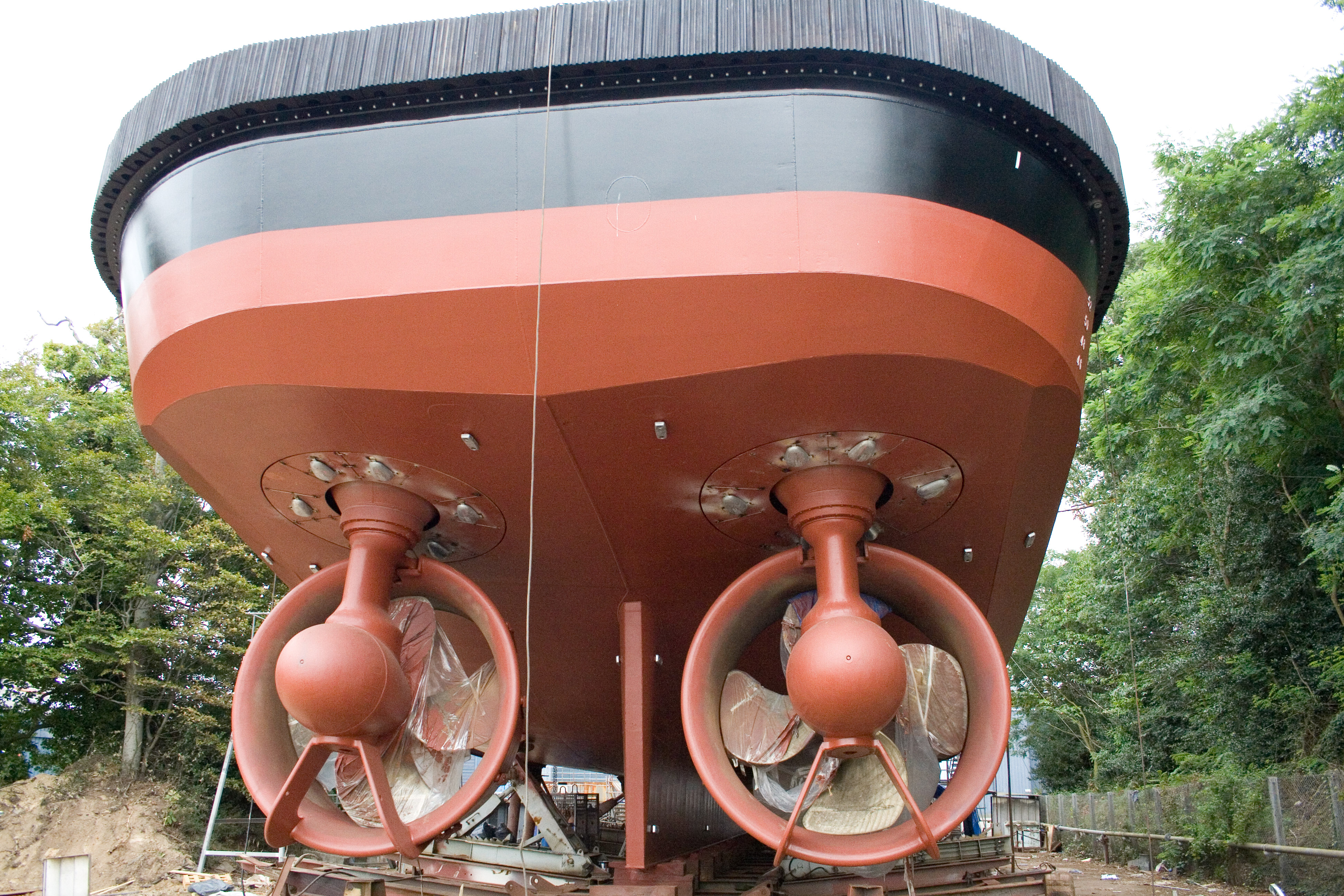 Chantiers Piriou à Concarneau - site de Roudouic - Remorqueur en construction